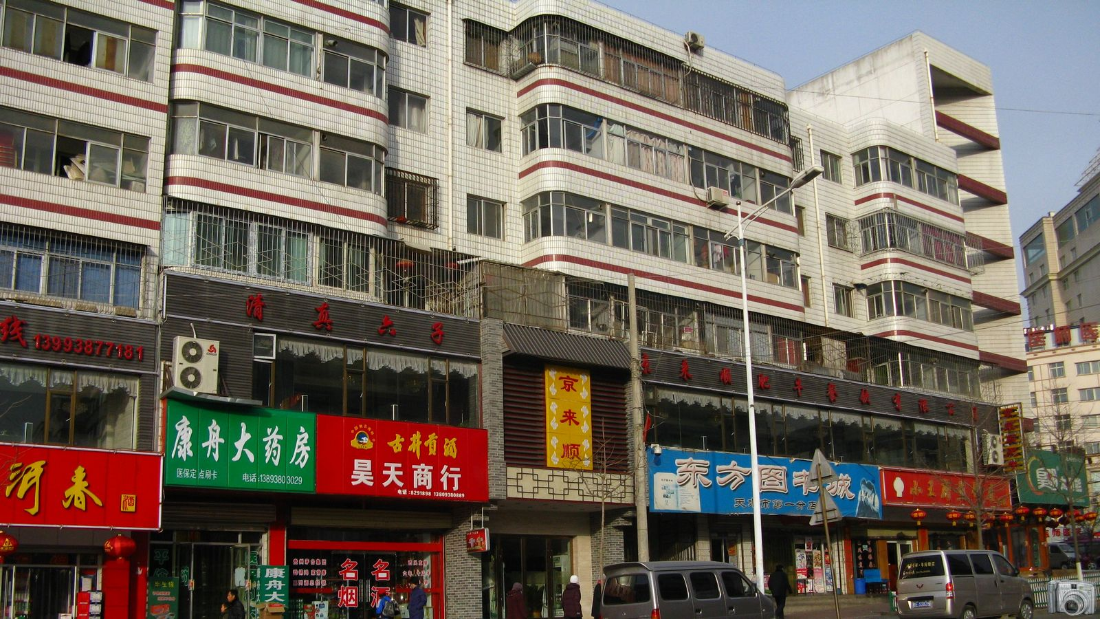 京来顺